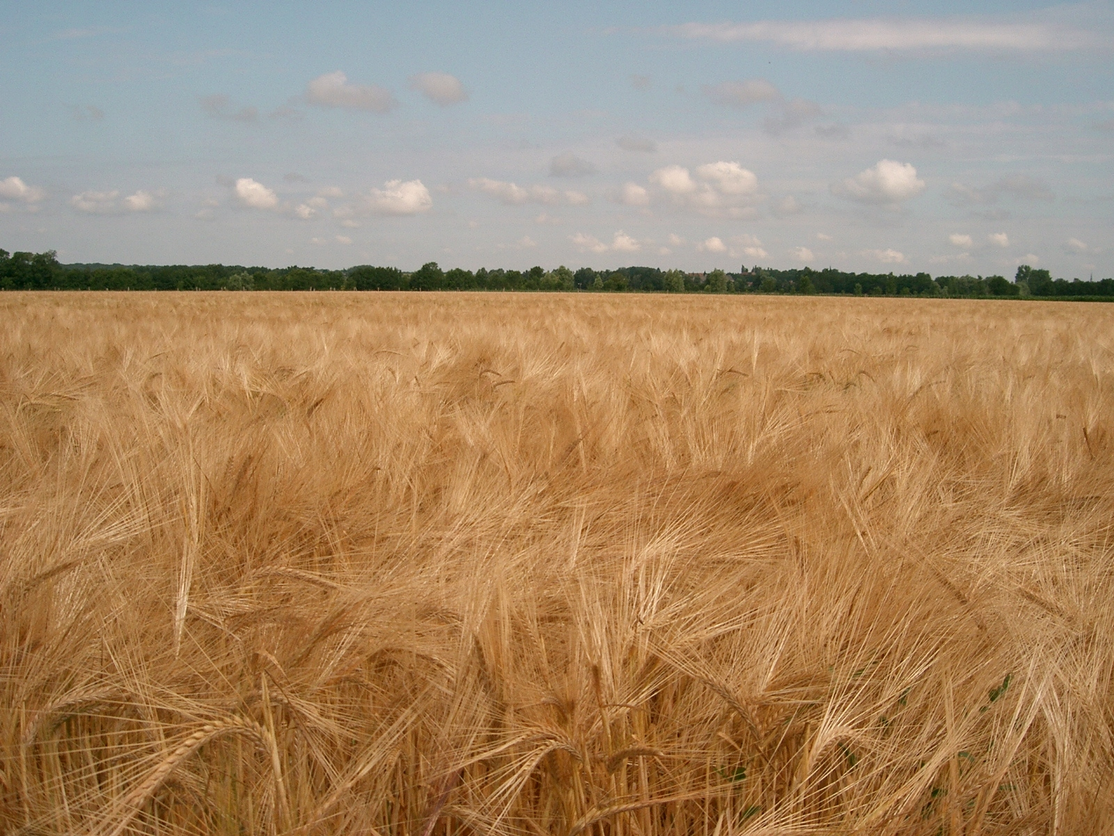 Chivres (France - 21) - céréales en Bourgogne self made PRA